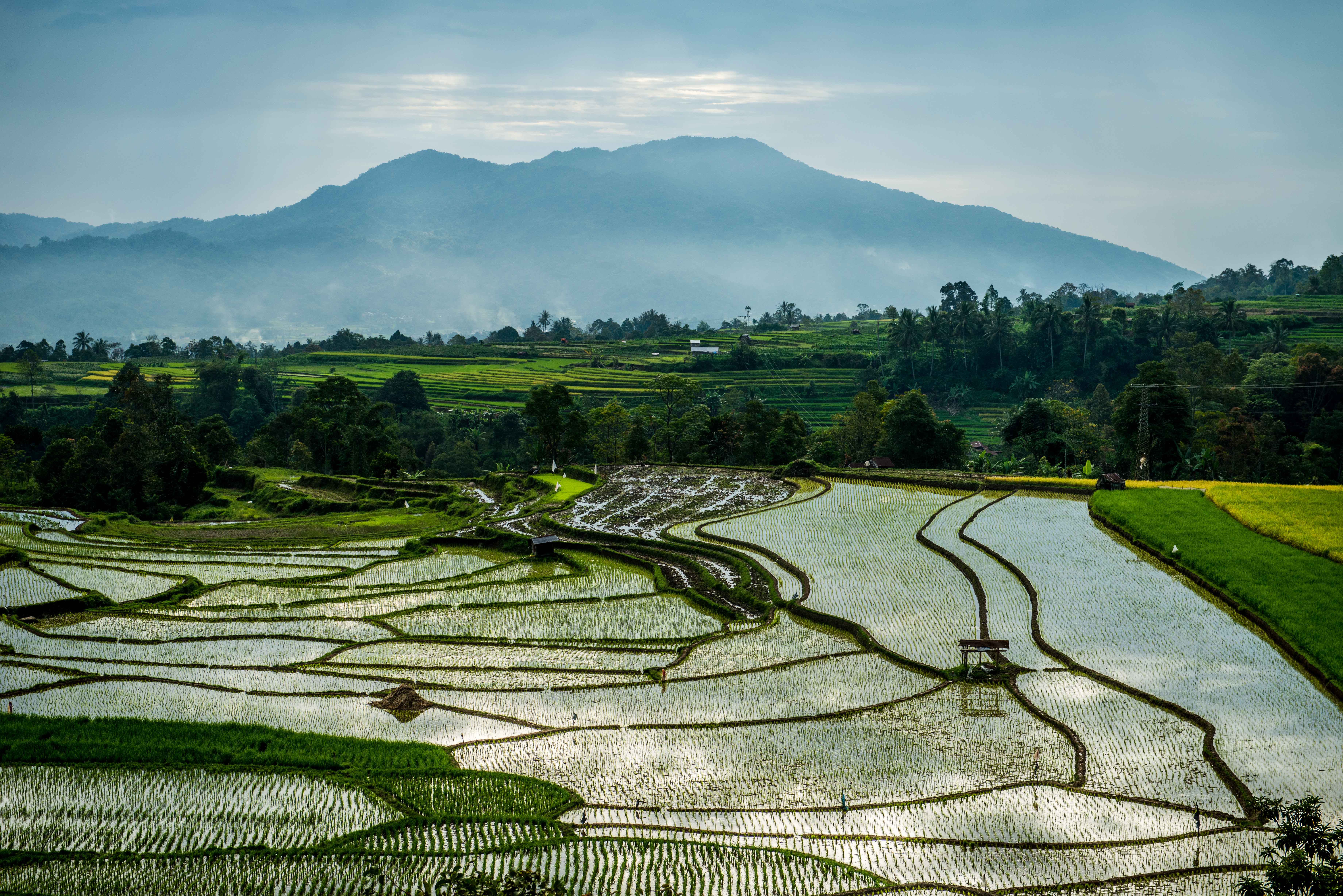 Sesudut Sawah di Tanah Datar